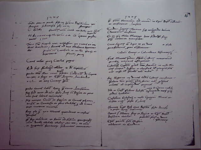 Fotografie einer Lichtkopie aus den ‚Annales Basilenses’; Fol. 16 der sog. ‚Stuttgarter Handschrift’ (WLB, cod. Hist. 4°,145 ).